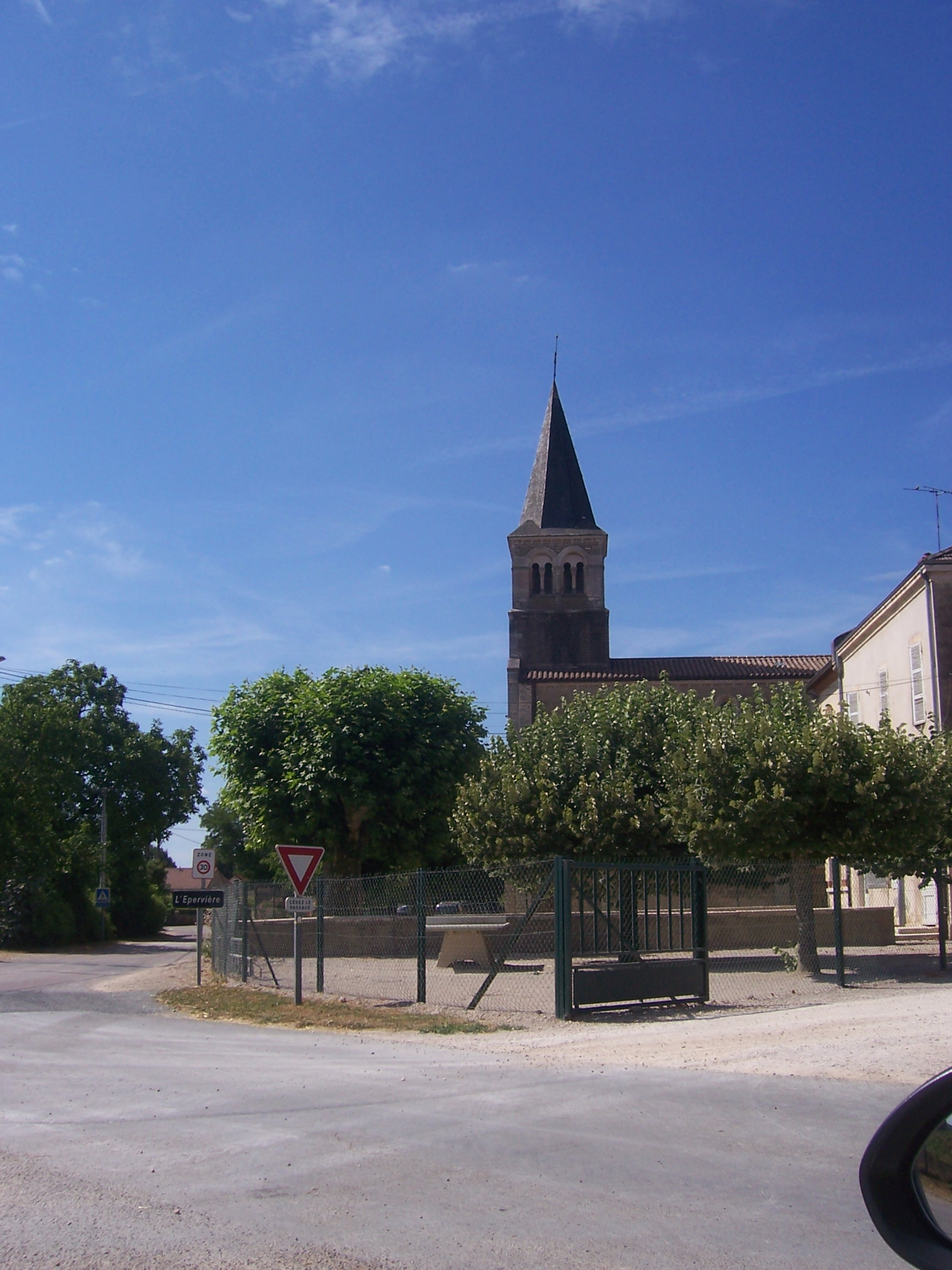 Eglise de Gigny-sur-Saône